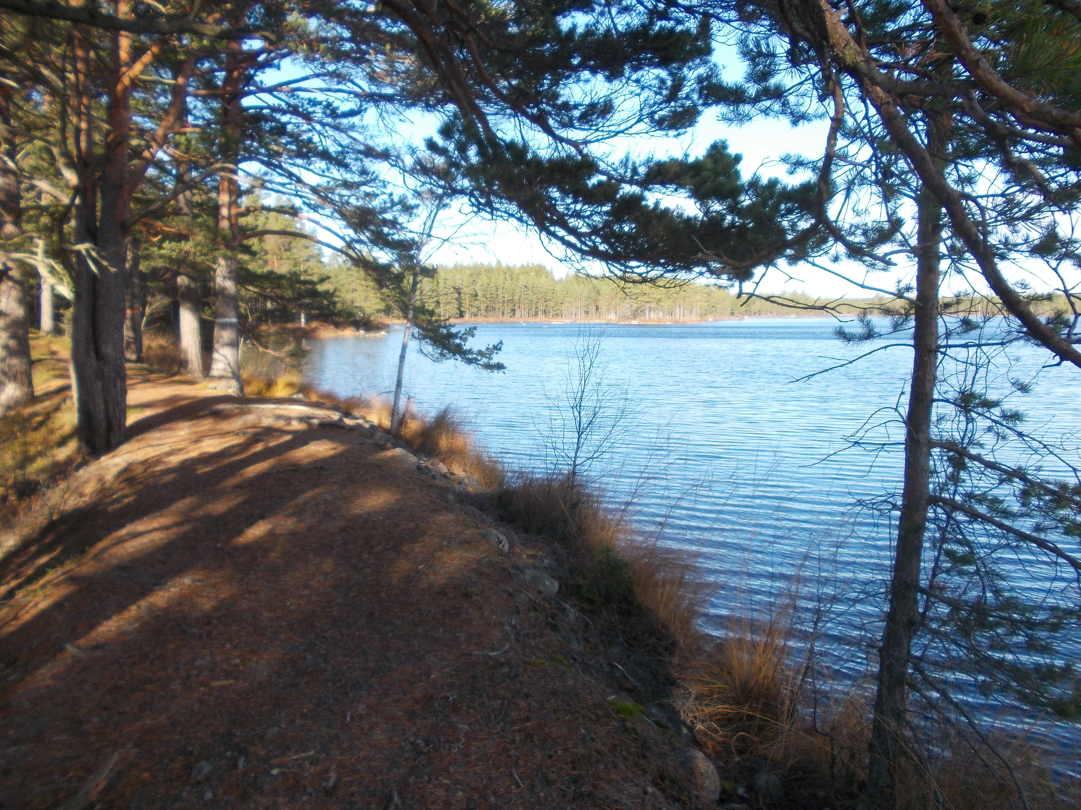 Munkastigen är en vandringsled i Tiveden.